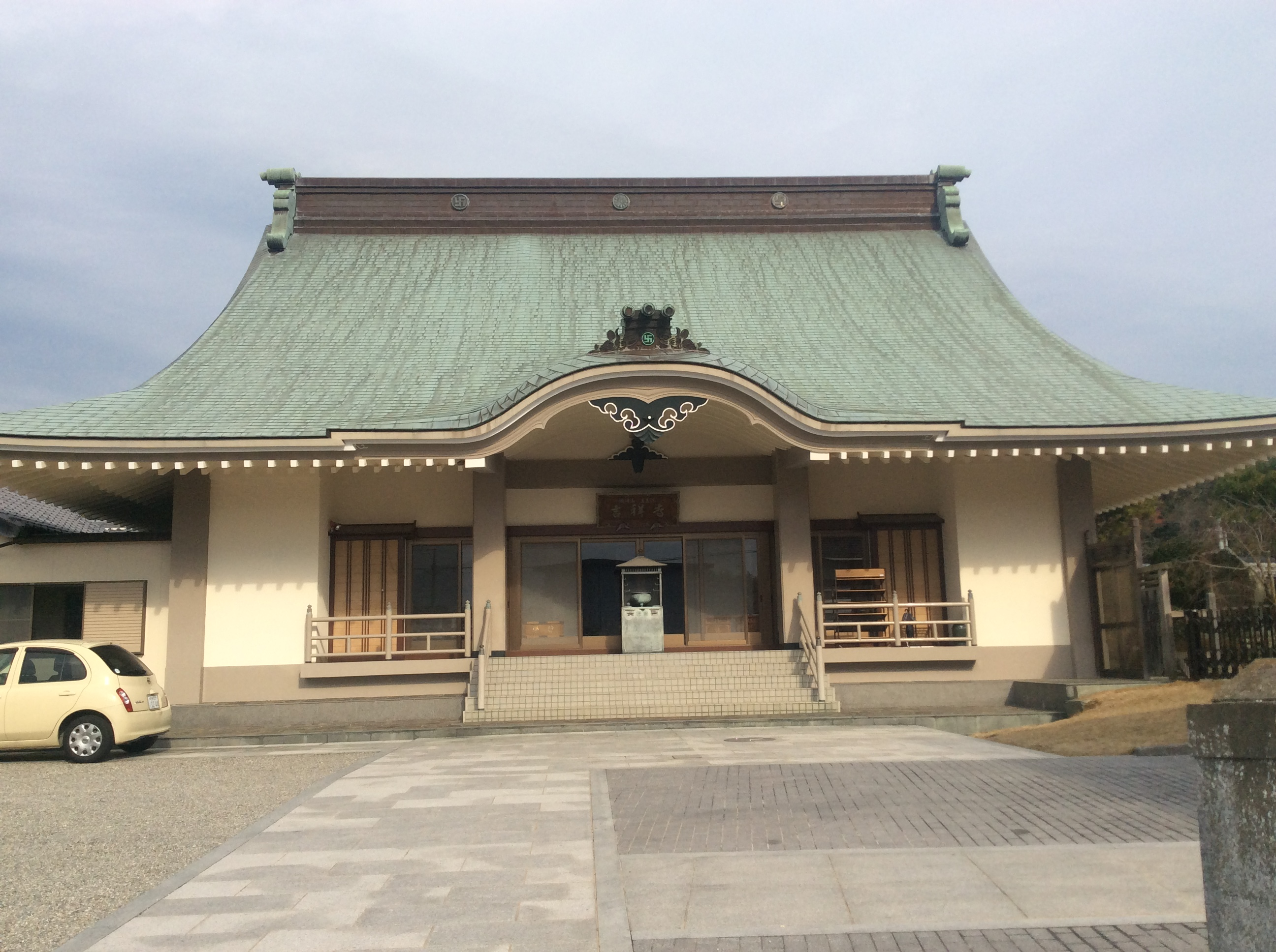 磯崎山吉祥寺